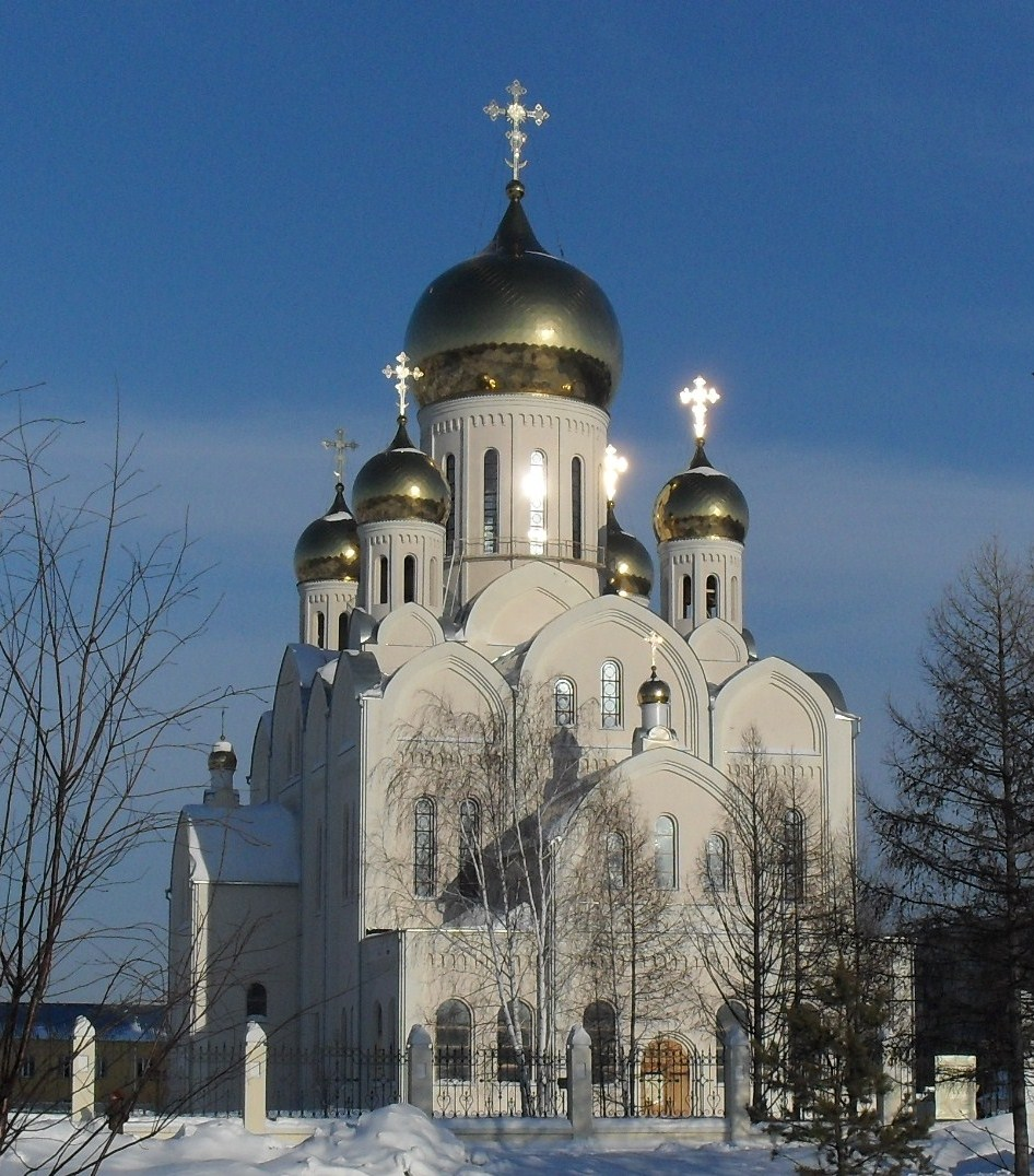 Троице-Владимировский собор